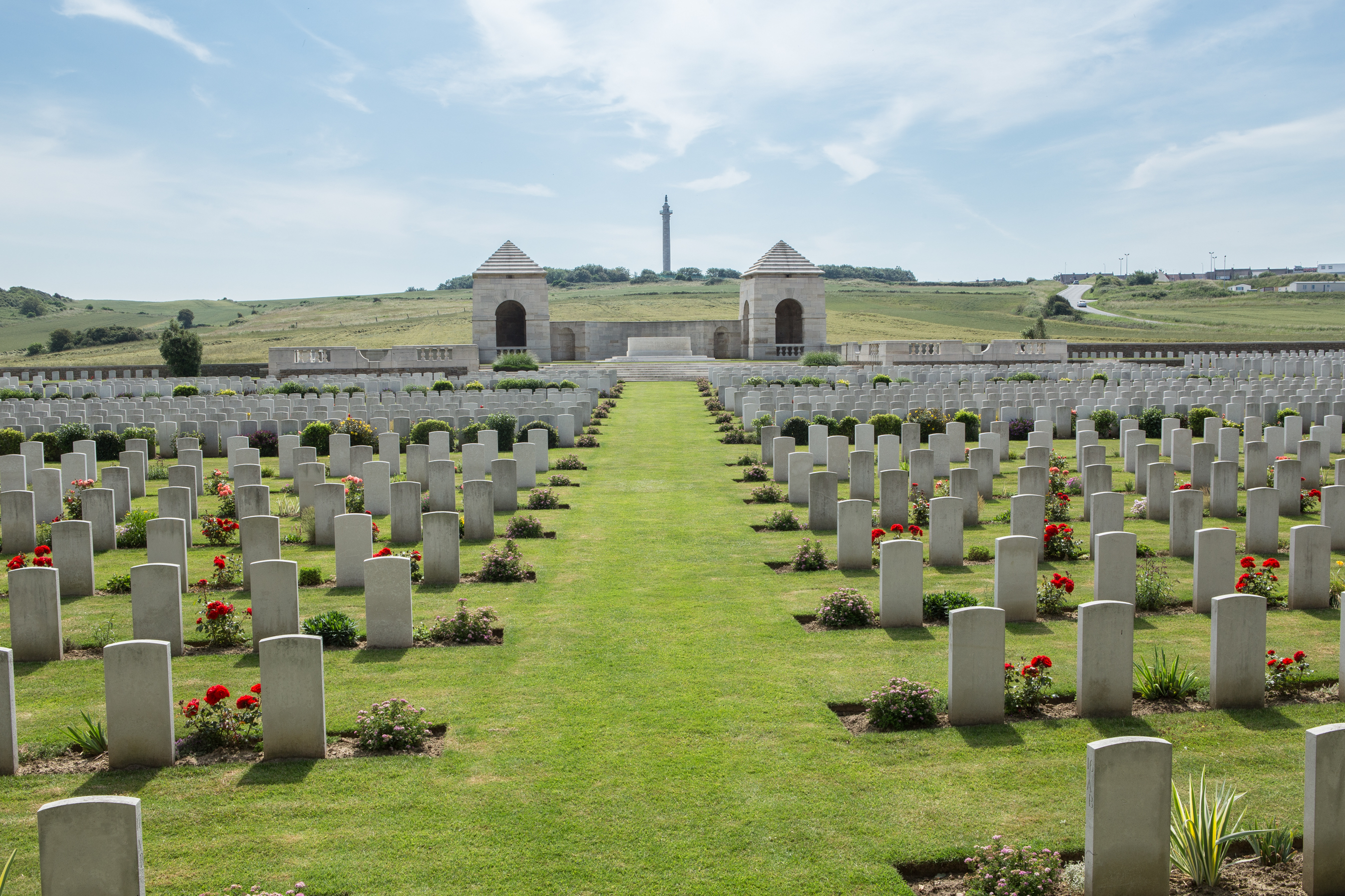 Terlincthun British Cemetery